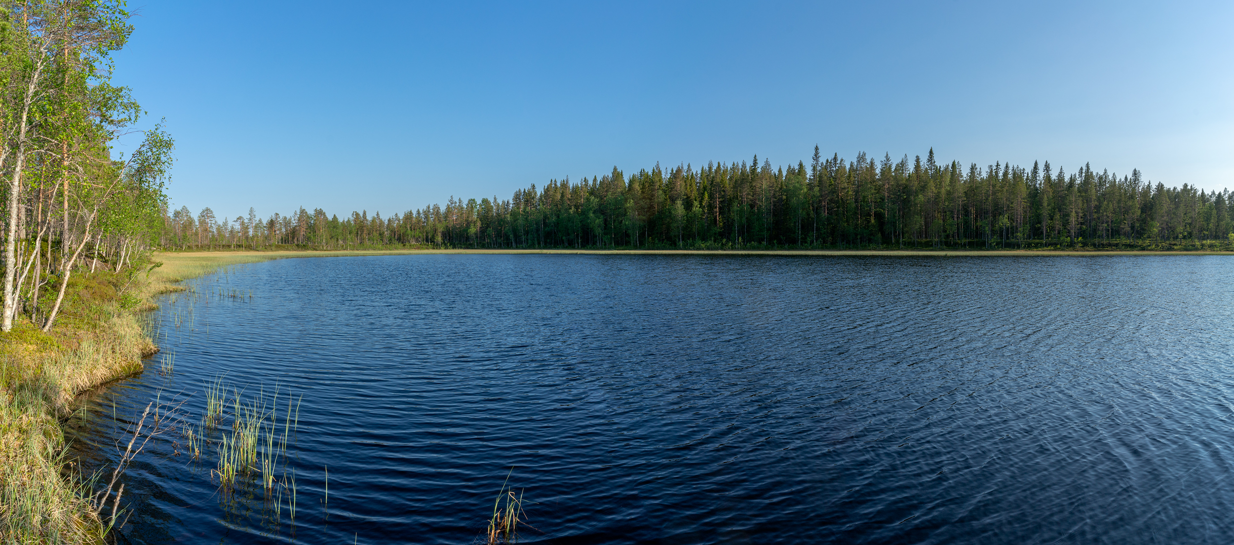 Mårdåstjärnen vid vindskyddet längs Lappmarksleden.